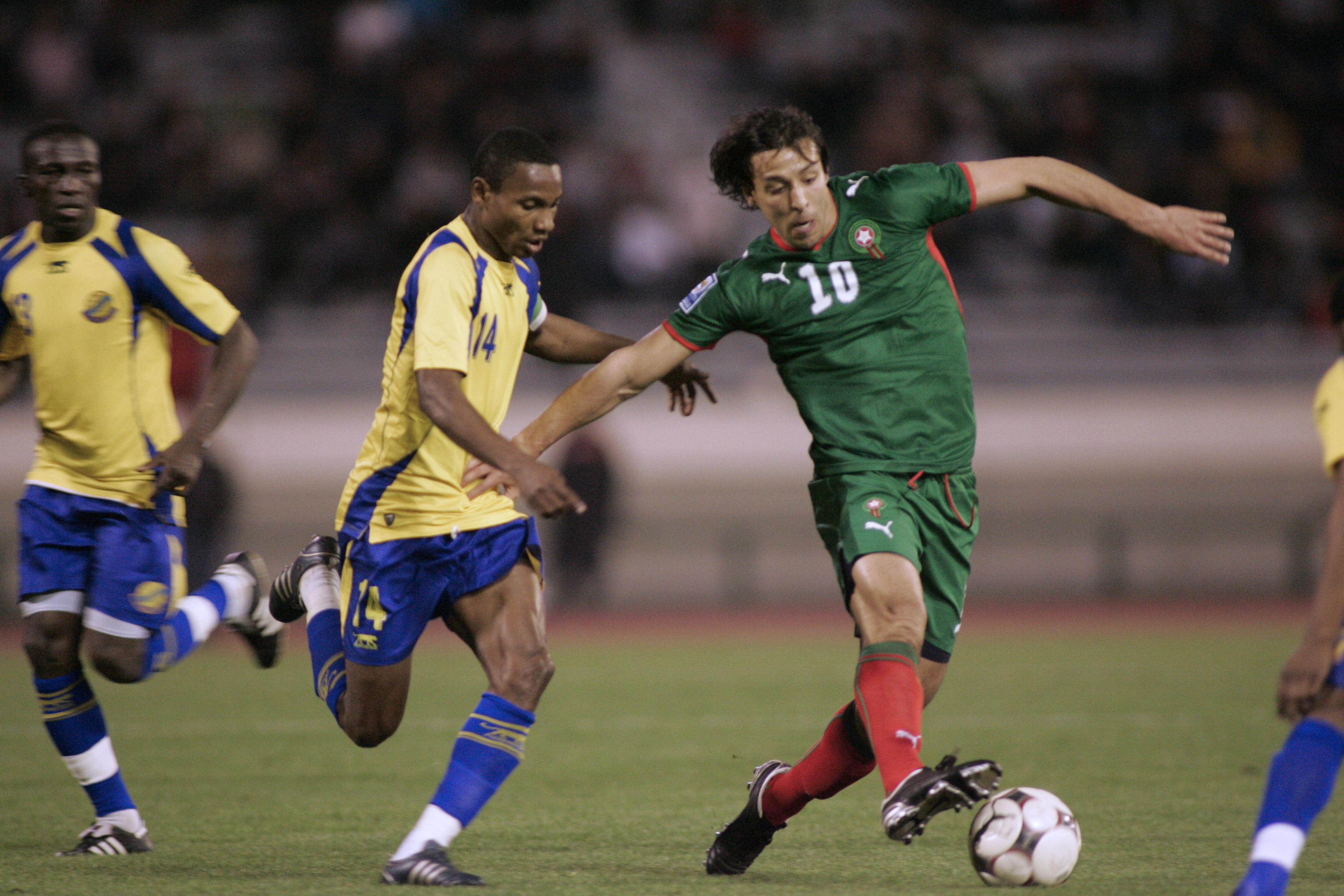 Mounir El Hamdaoui